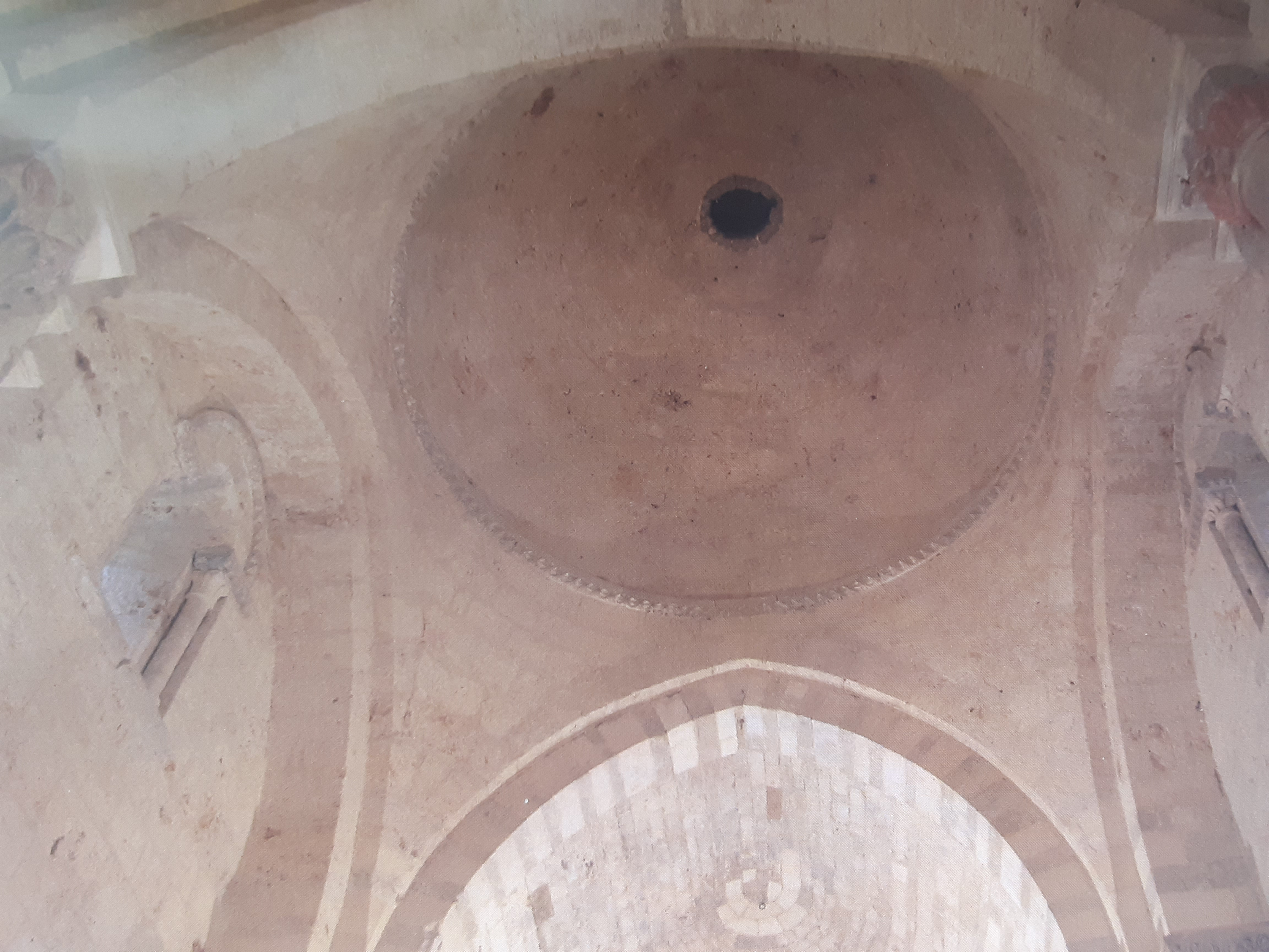 Es la cúpula de la ermita burgalesa de Nuestra Señora del Valle. La iglesia es románica ojival bizantina y del siglo XII